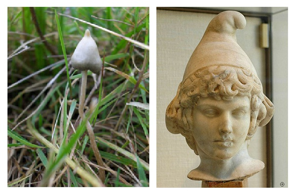 A gauche, un psilocybe semilanceata et à droite la forme analogue au champignon: le bonnet des habitants antique de Phrygie qui proclamaient leur liberté. Le bonnet phrygien à aussi servi de symbole lors de la Révolution française.